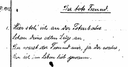 Snippet from Joseph Goebbels first poem "Der tote Freund"